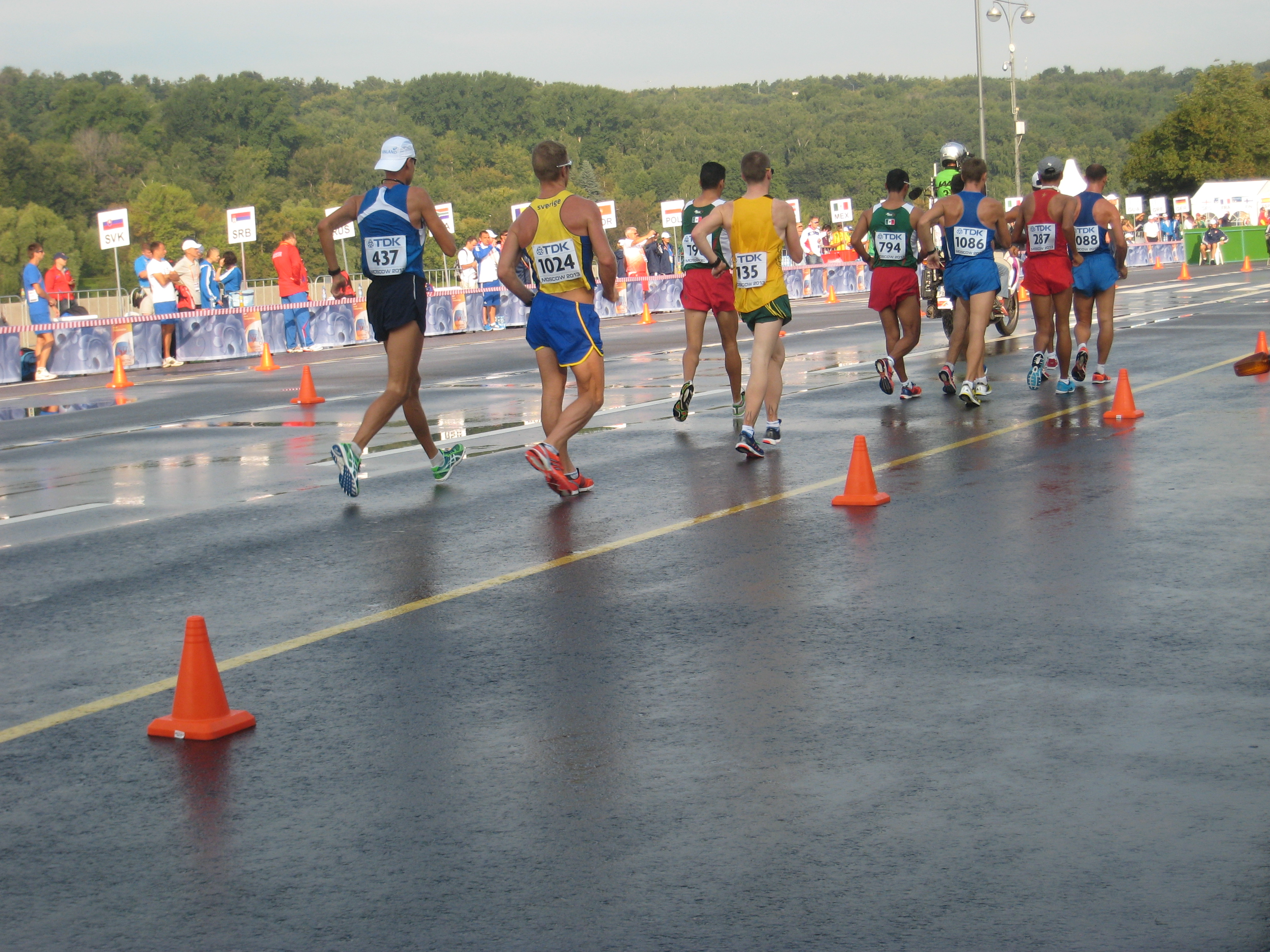 Чемпионат мира по лёгкой атлетике 2013. Ходьба 50 км, мужчины. Пелотон